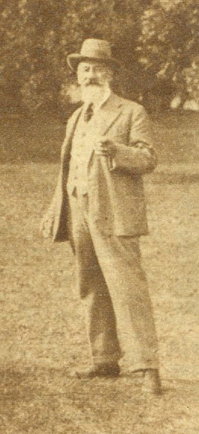 Franz Seifert (1866–1951). Aufgenommen im September 1928.